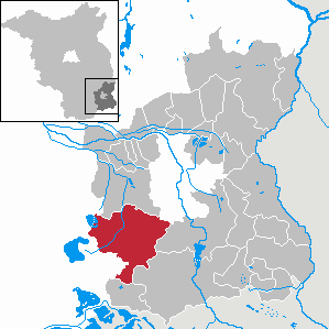 Drebkau in Brandenburg (Country) - District Spree-Neiße